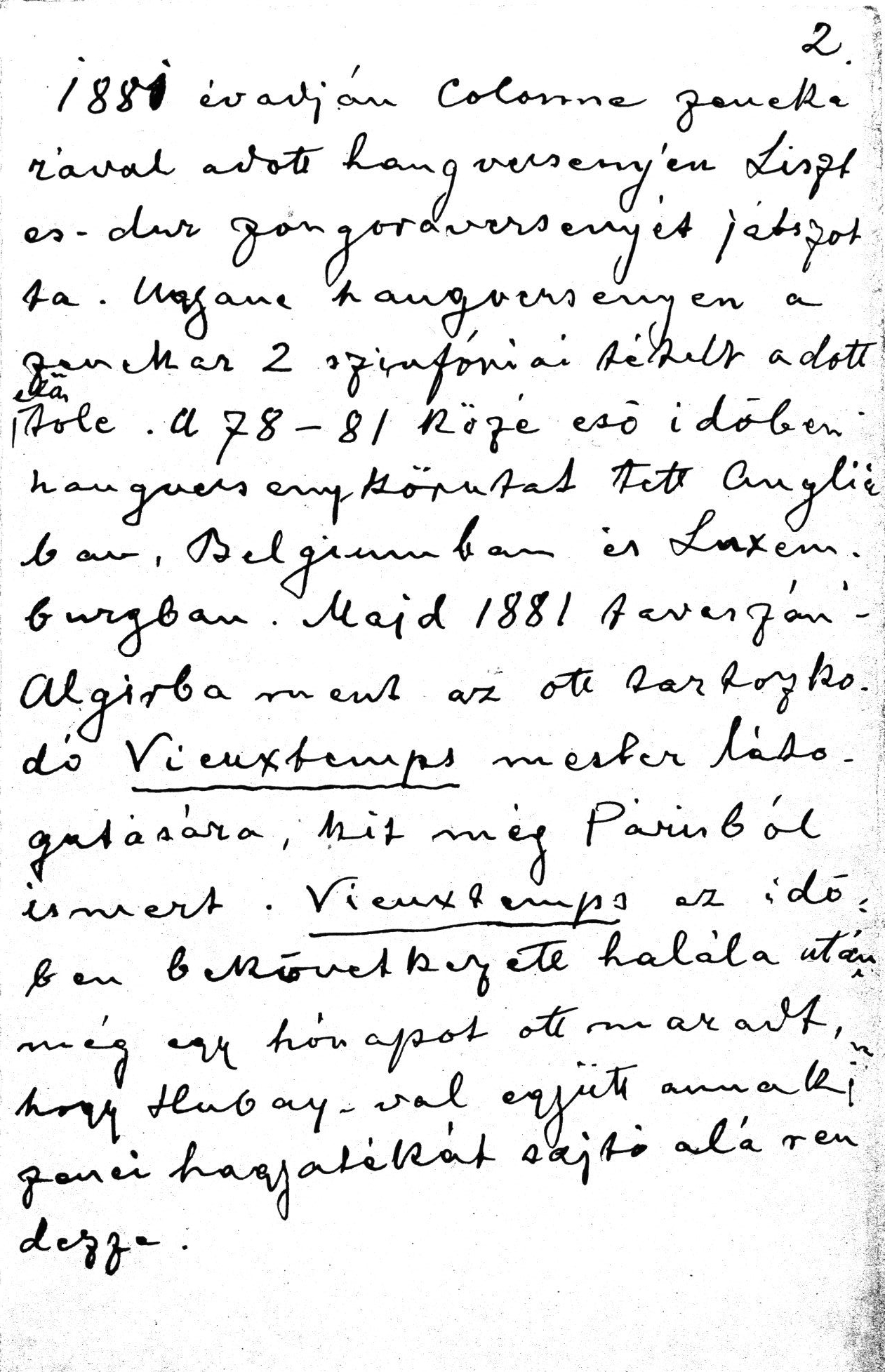 Aggházy Károly saját kezű önéletrajza